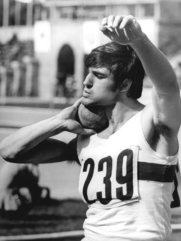 Stefan Schreyer ADN-ZB Demme 25.6.72 Erfurt: XXIII.DDR-Leichtathletik-Meisterschaften- Neuer Titelträger im Zehnkampf wurde Stefan Schreyer (SC Chemie Halle), hier beim Kugelstoßen, mit 7942 Punkten.